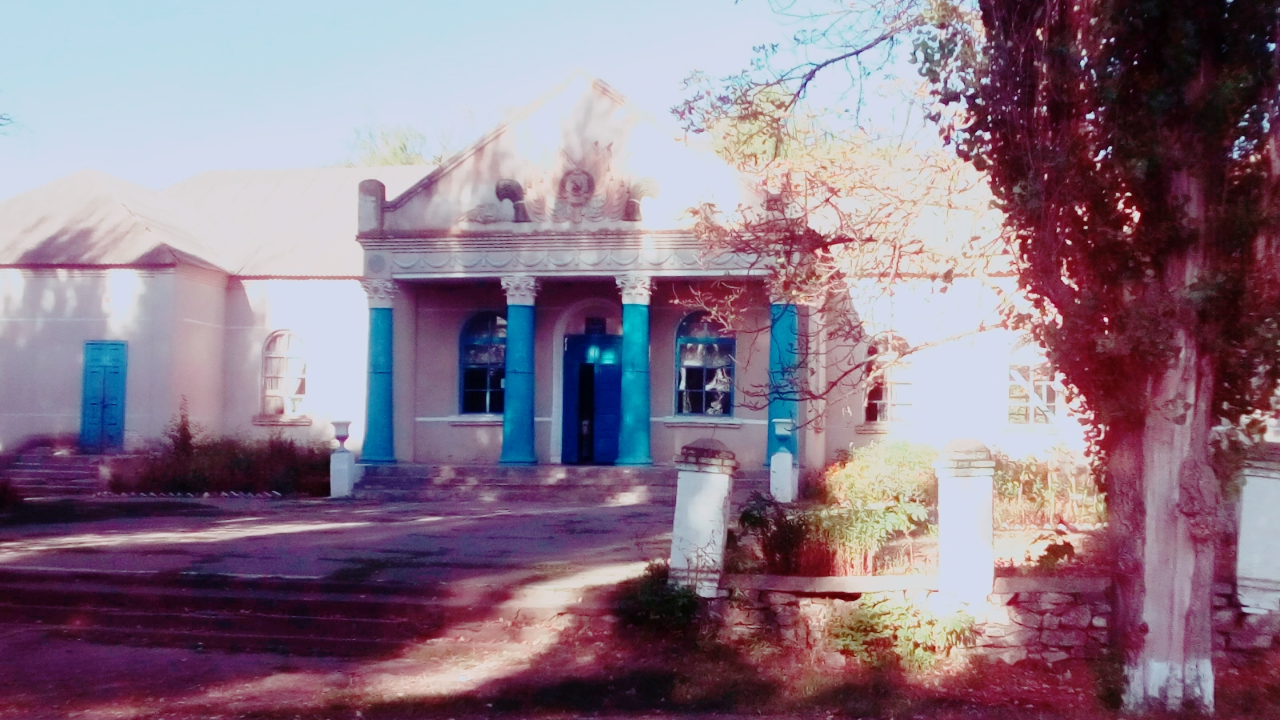 Седнівський будинок культури.